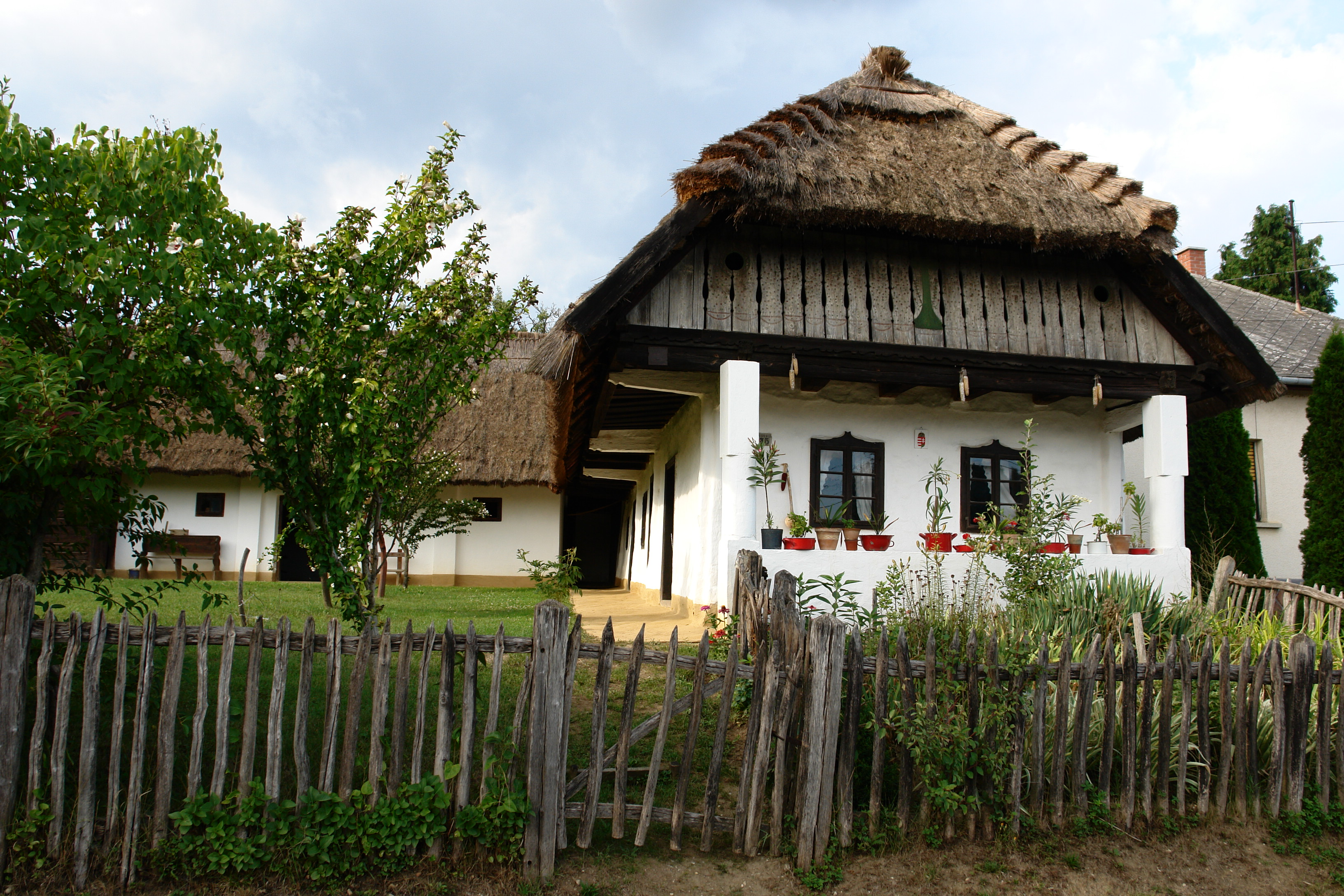 Népi lakóház (tájház), Zalalövő This is a photo of a monument in Hungary. Identifier: 11089